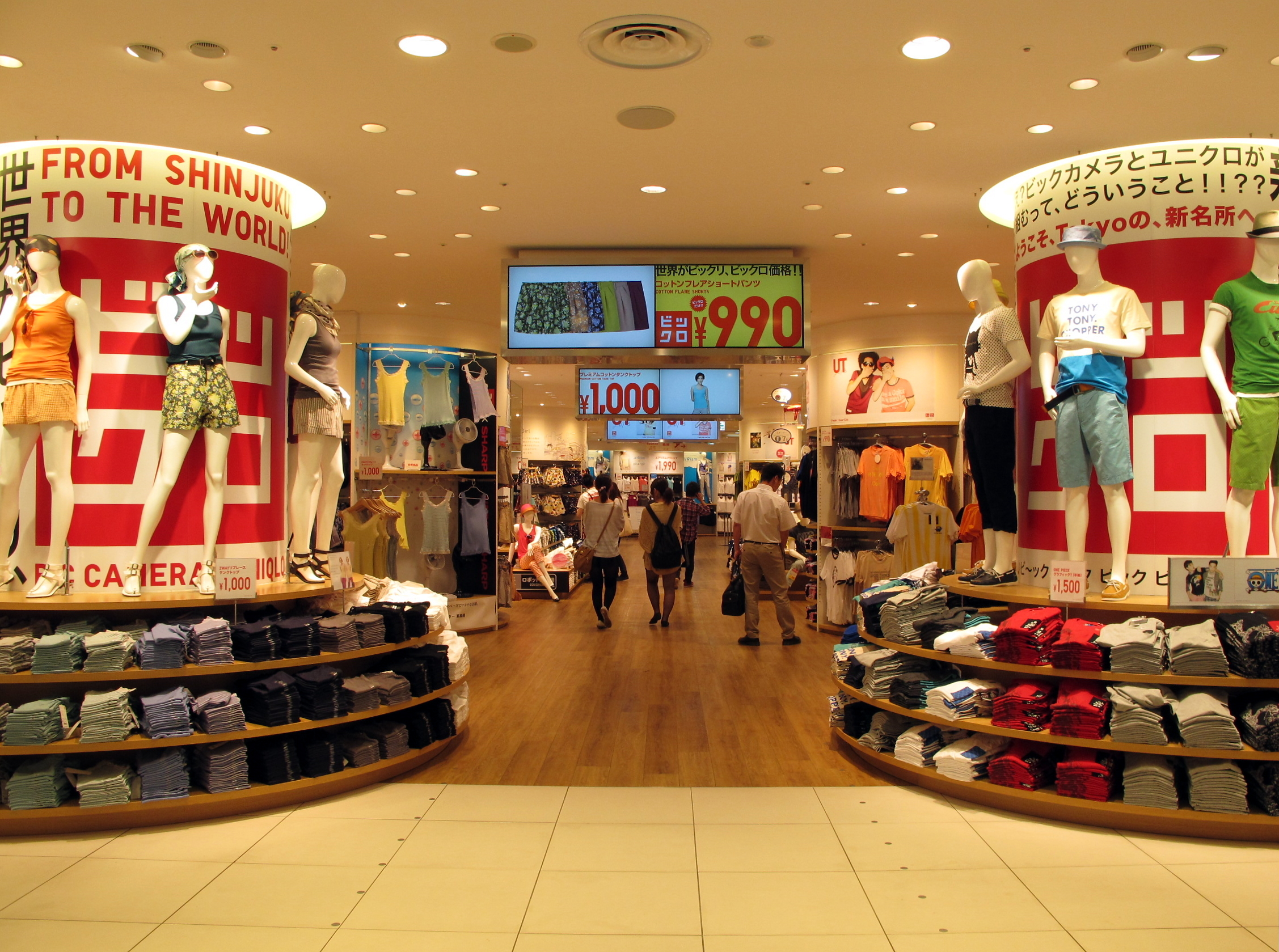 ビックロ BICQLO Uniqlo